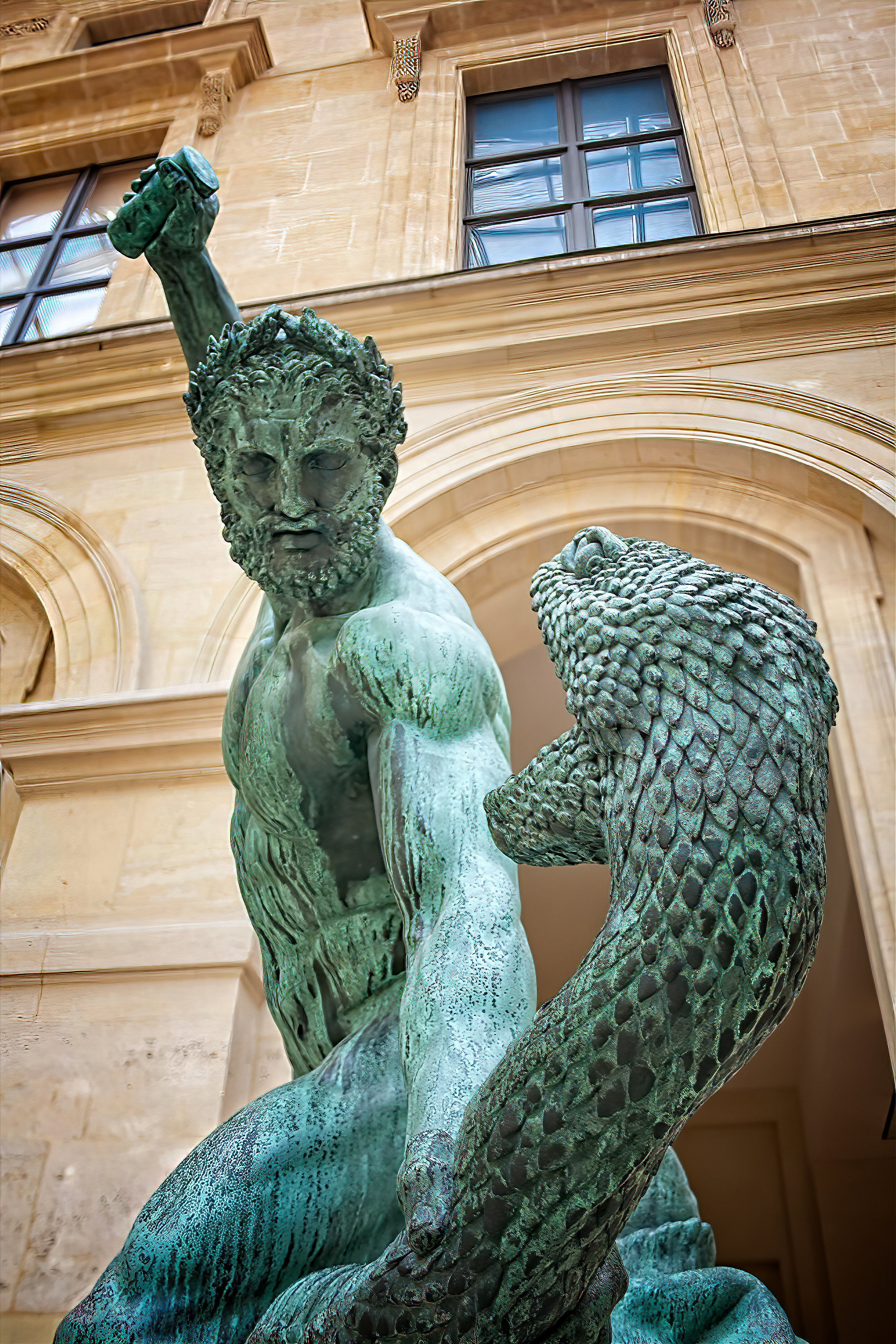 Museo del Louvre París, Francia